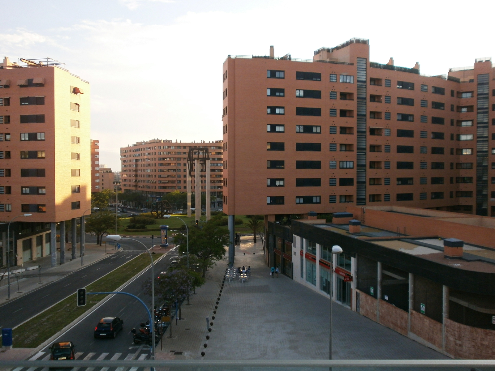 Vista de la calle Jacinto Masanet con la plaza alcalde Agatángelo Soler al fondo, Alicante, España.